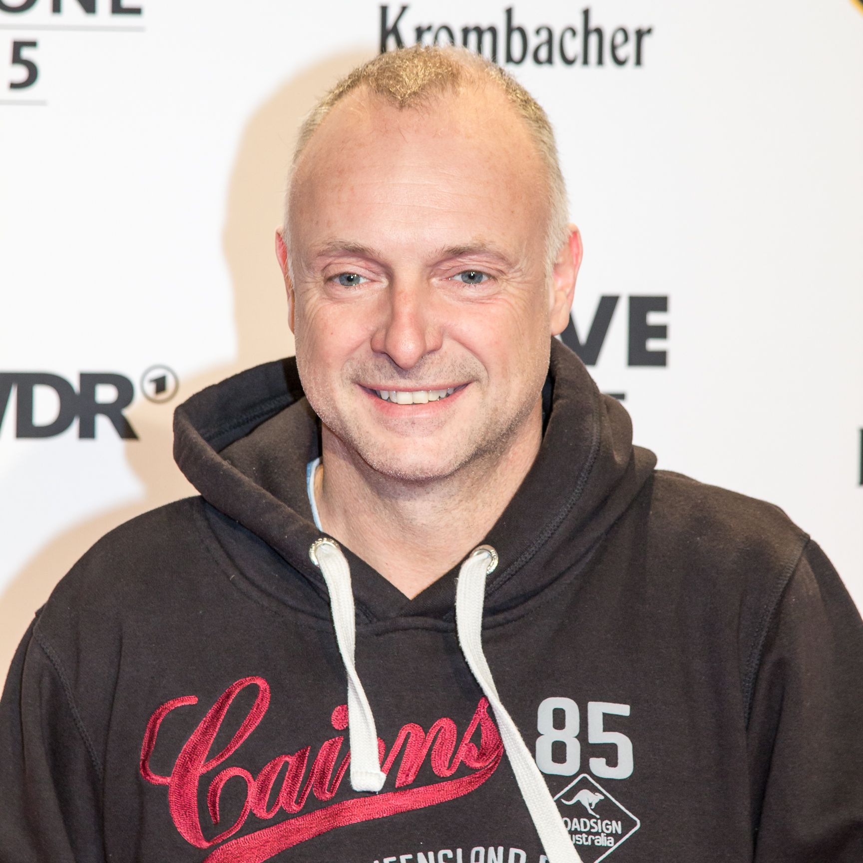 1liVE Krone 2015 - Frank Buschmann